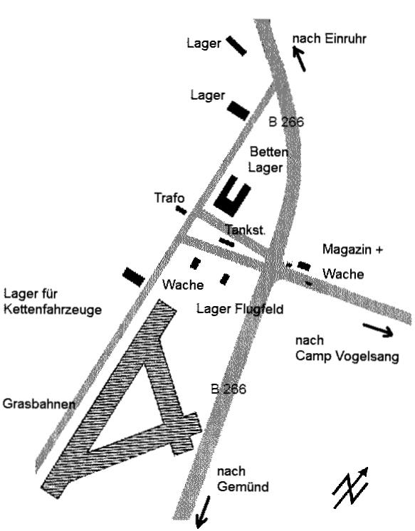 ehemaliges Flugfeld Walberhof (Graspisten) für leichte Flugzeuge und Helikopter der belgischen Armee (bis 2006). Dieses Flugfeld wurde schon von der NS-Ordensburg genutzt und war auch in Gebrauch im Westfeldzug. Ende 1944 wurde eine Messerschmidt Jagdflugzeugstaffel auf Vogelsang stationiert. 1963 stürtze hier eine Piper Cub ( L-18C) der belgisches Heeresflieger ab. Der Pilot und ein Begleiter kamen zu Tode.